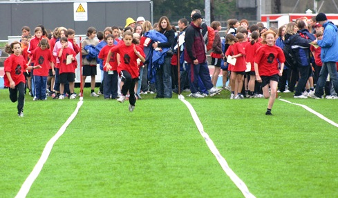 Schweizerische Kadettentage 2008 Winterthur Schnellauf